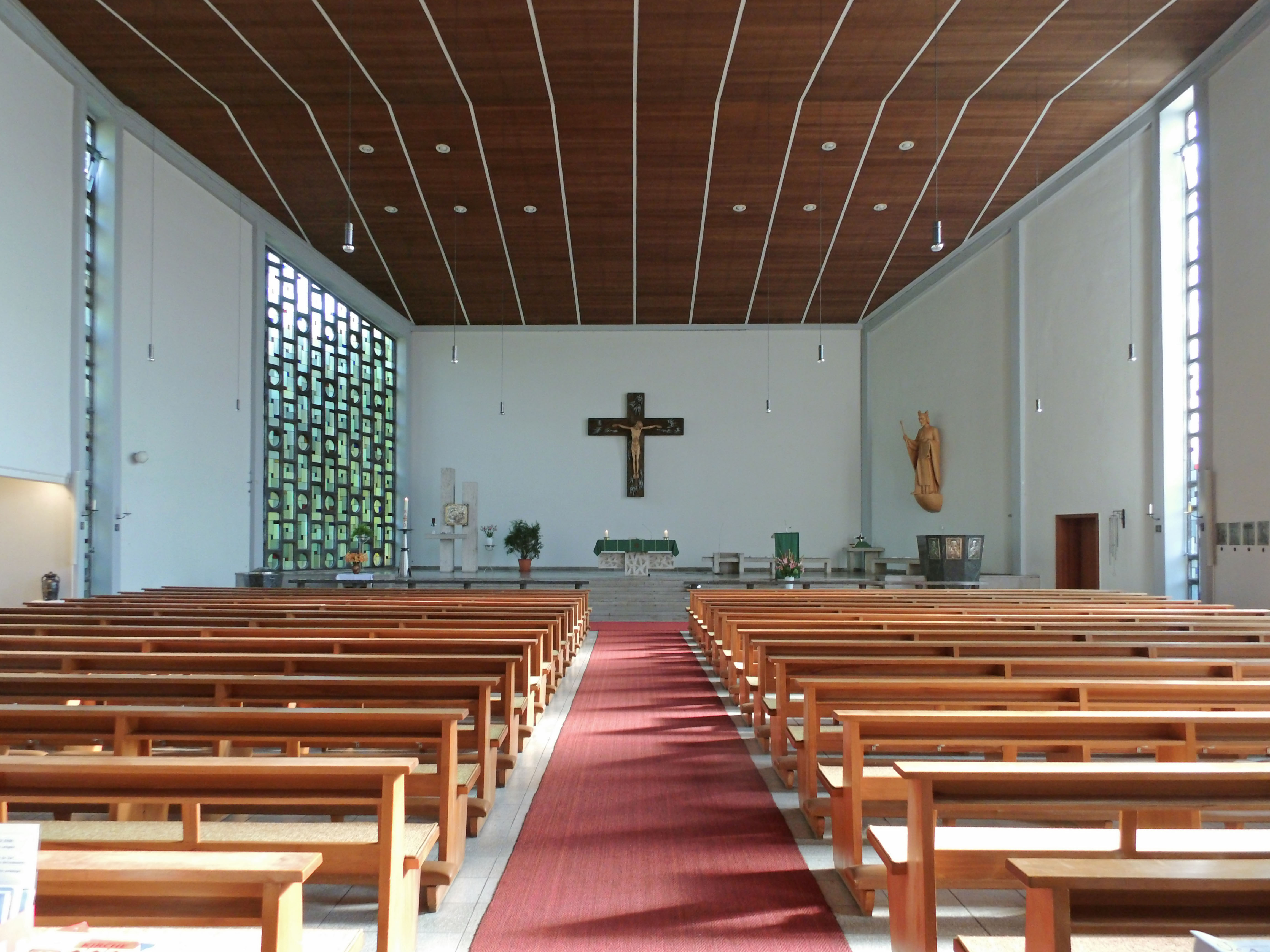 Katholische St.-Heinrich-Kirche in Braunschweig, Stadtteil Südstadt.